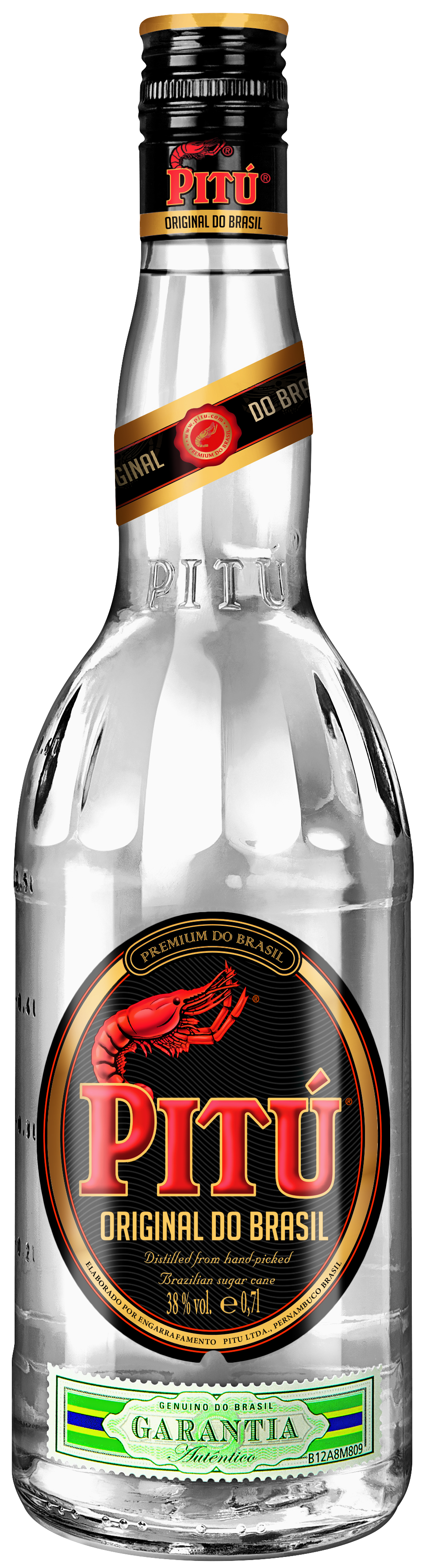 PITU 0,7l